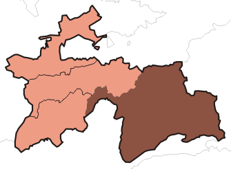 Gorno-Badakhshan Autonomous Province (Viloyati Mukhtori Kuhistoni Badakhshon)